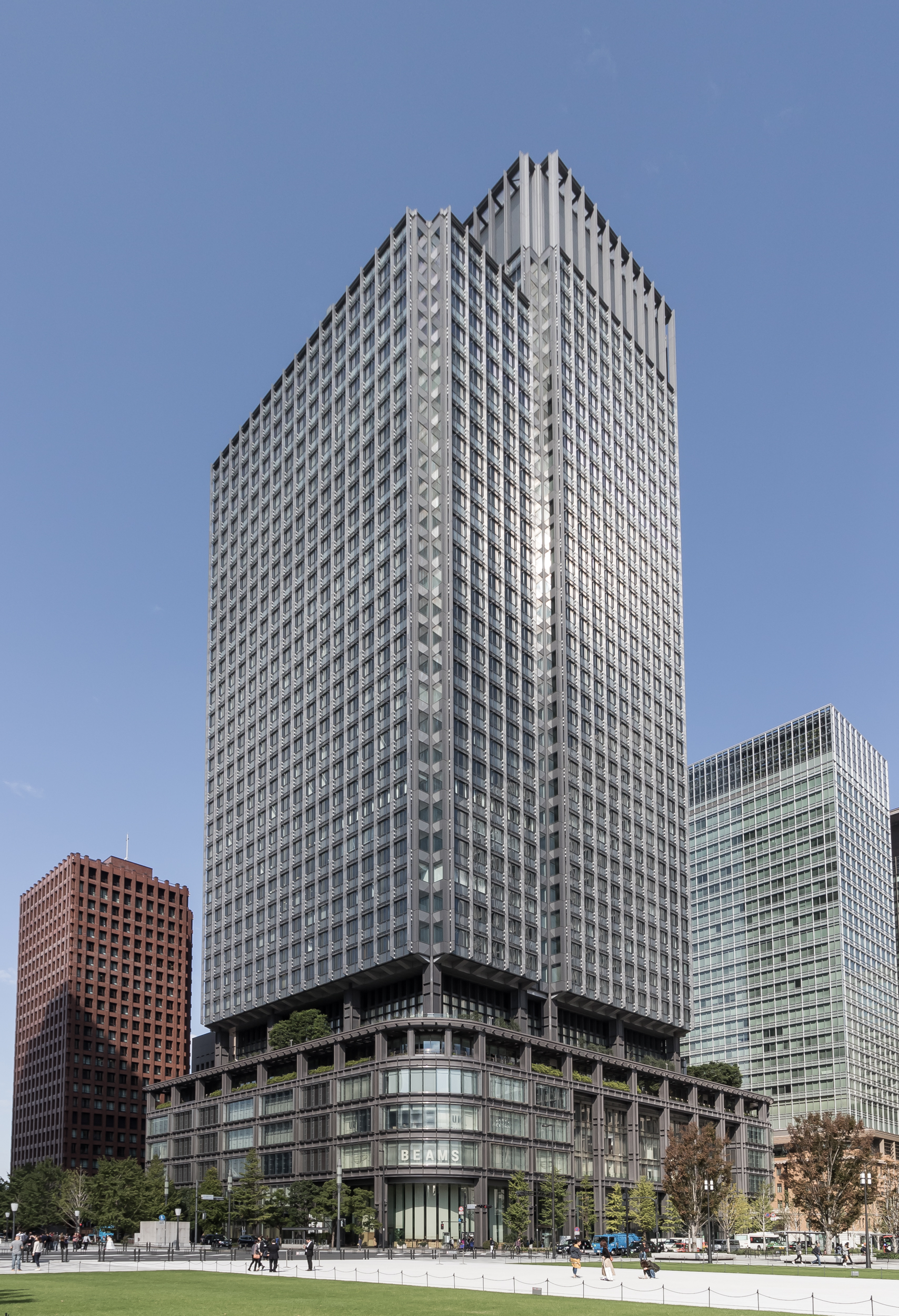 新丸の内ビルディング（東京都千代田区）